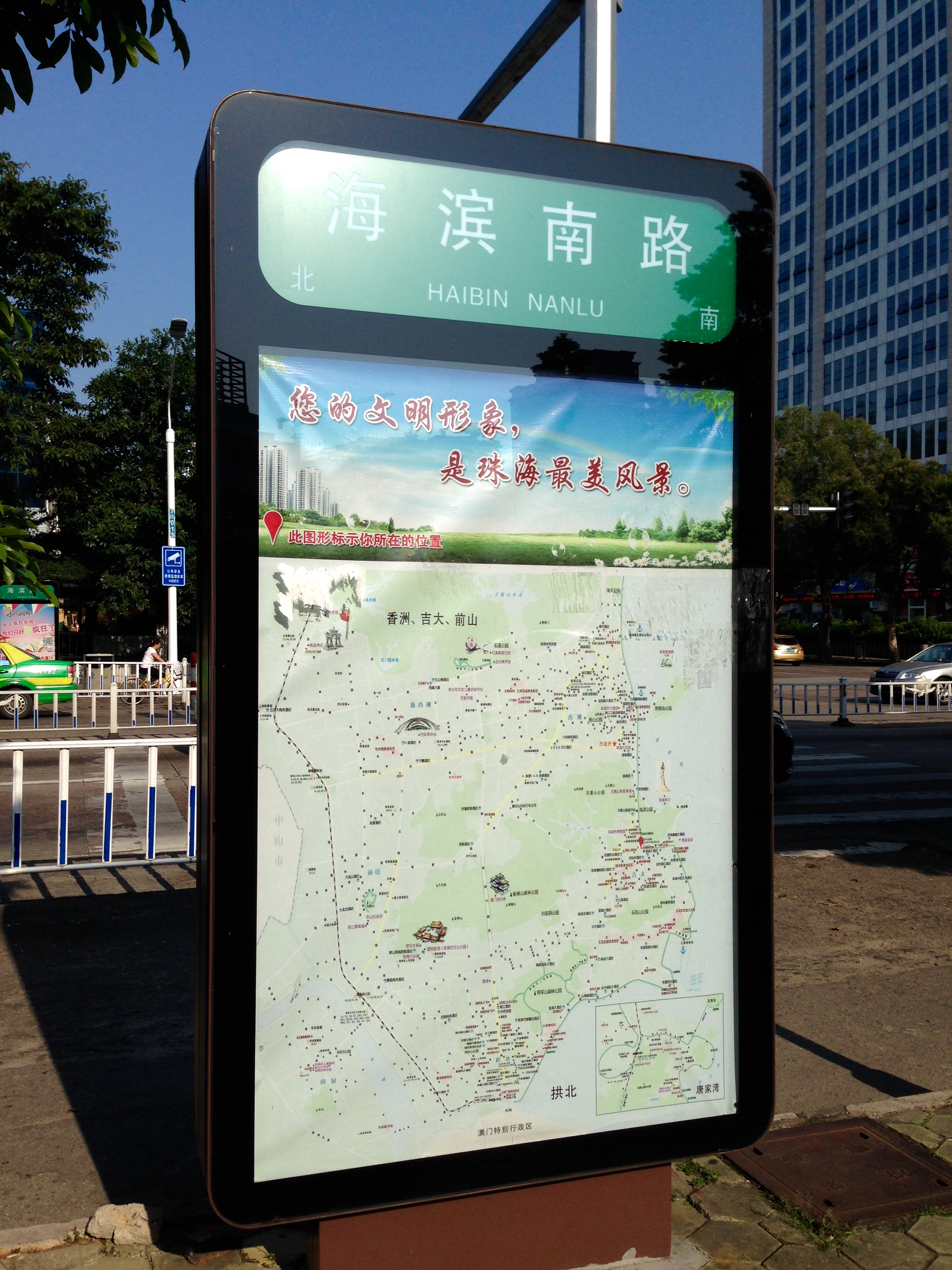 粵語: 珠海市海濱南路嘅路牌